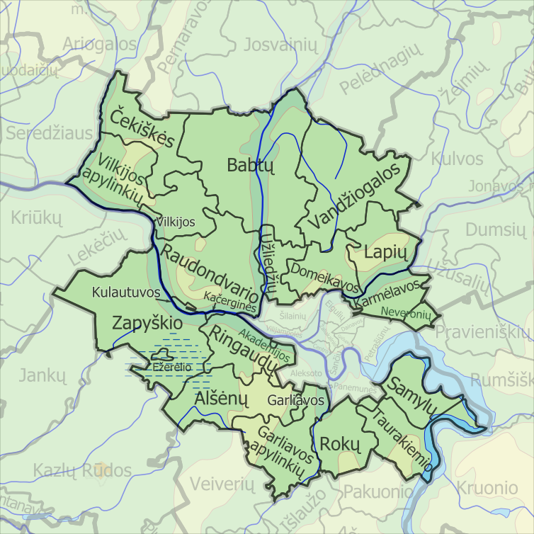 Padaryta iš lt::image:LietuvosSeniunijos.png.